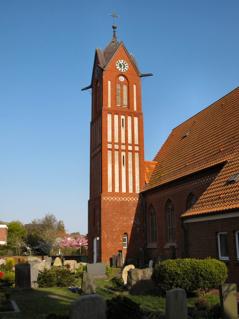 Evangelisch-lutherische Inselkirche auf der ostfriesischen Insel Langeoog